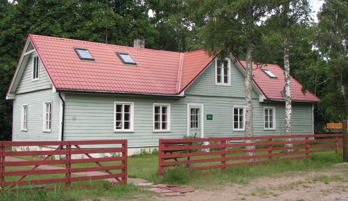 Prangli Põhikool